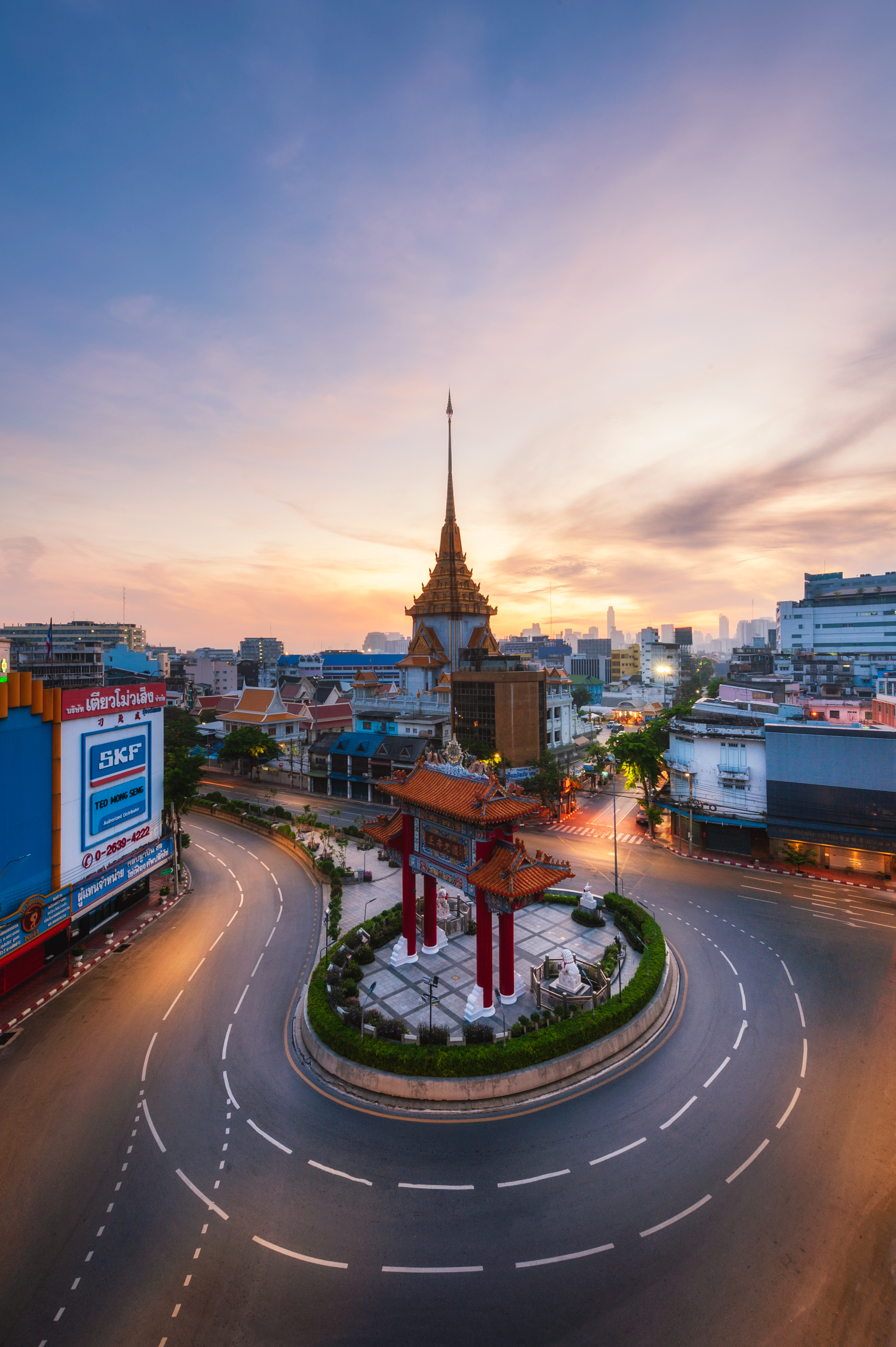 วัดไตรมิตรวิทยารามโดยมีฉากหน้าเป็นวงเวียนโอเดียน